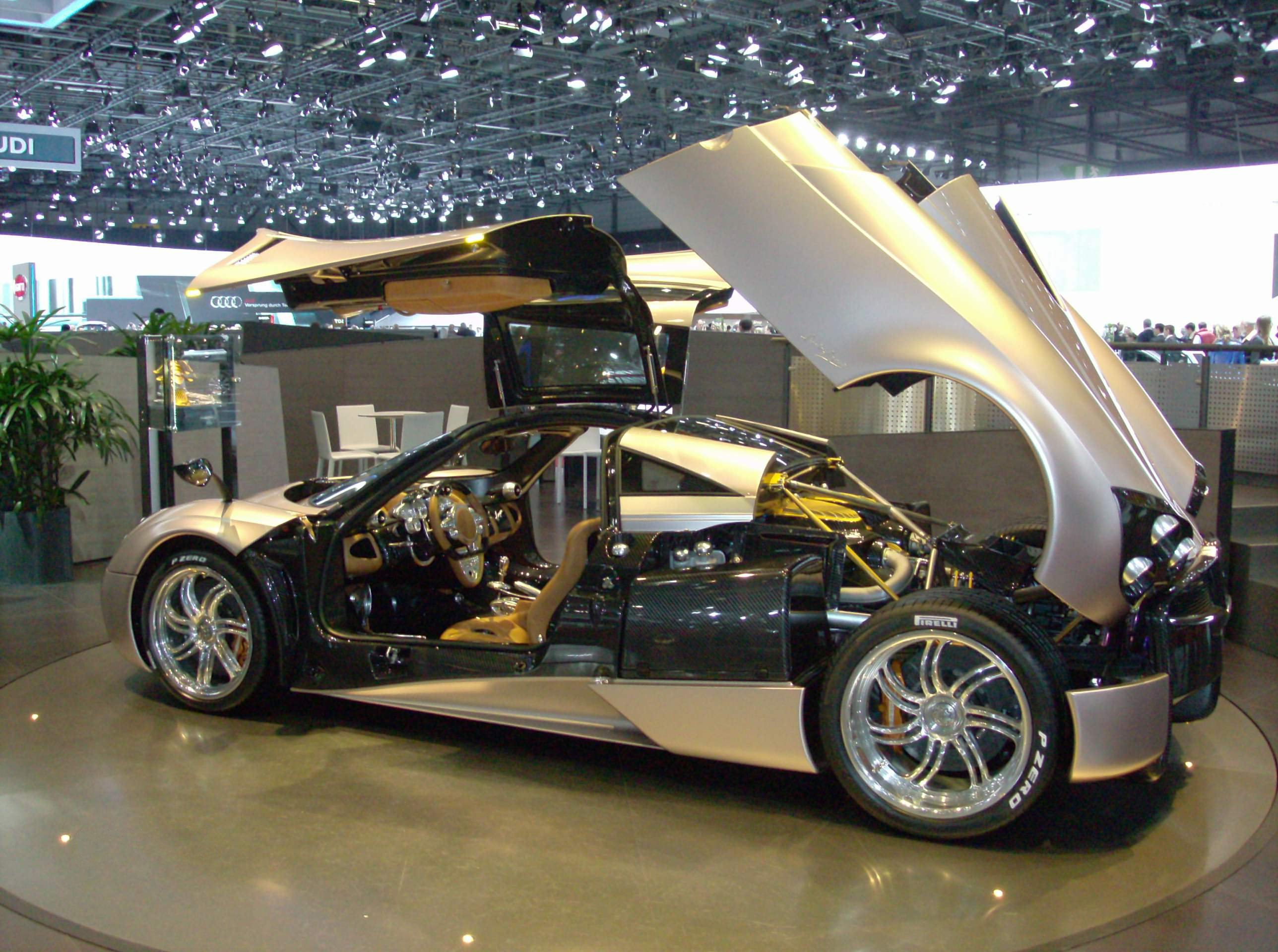 Pagani Huayra, 81° Salone Internazionale dell'auto Ginevra 2011